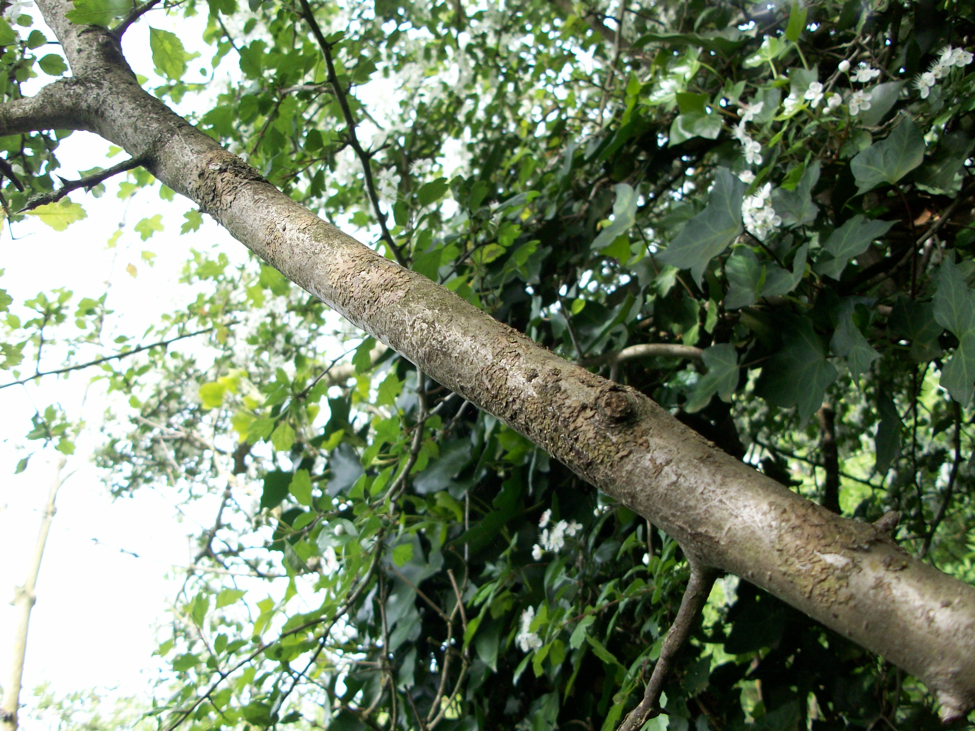 Écorce de Crataegus laevigata, Coudekerque-Branche (Nord), lisse à l'état jeune, devenant écailleuse et fissurée en vieillissant.